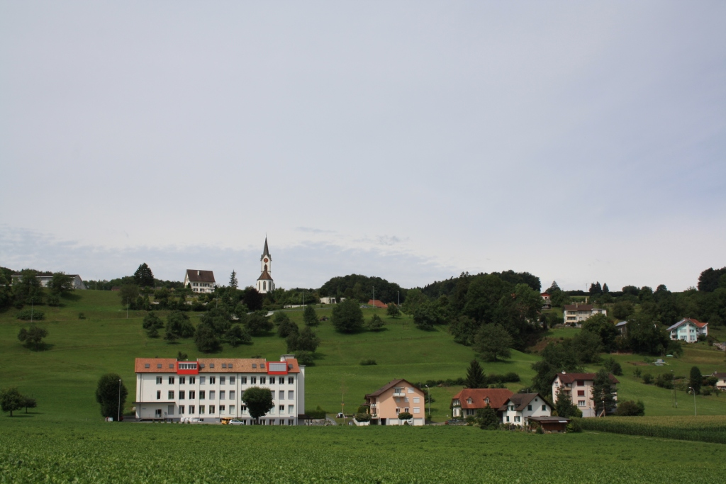 Reitnau